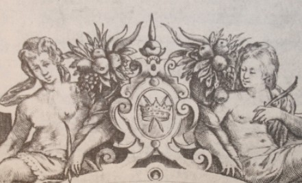 Le motif de la Plume couronnée extrait d'un oeuvre de van den Velde